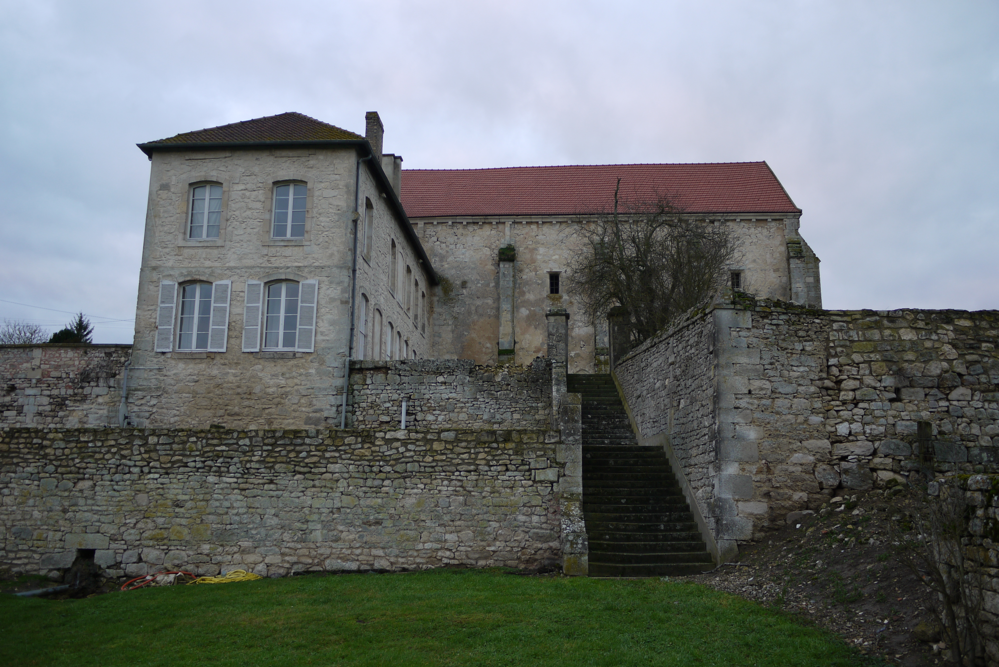 Grange de Montaon, à Dravégny.